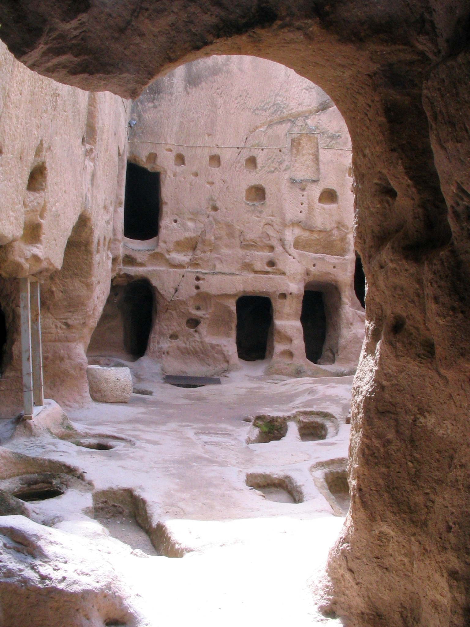 Eingang zur Klosteranlage von Eski Gümüş bei Niğde in Kappadokien, Zentraltürkei